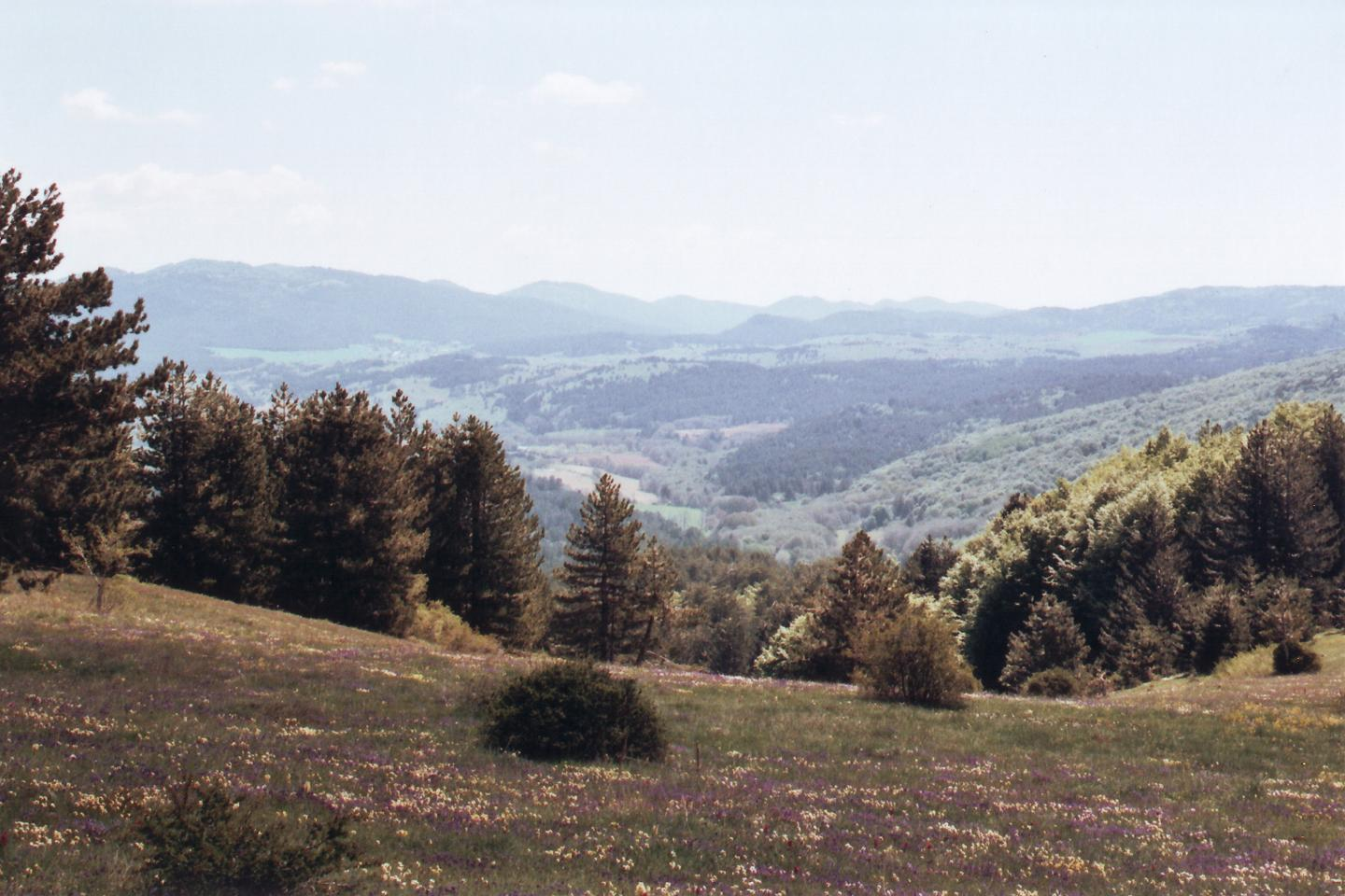 Autore della foto: Bruno Francesco Pileggi